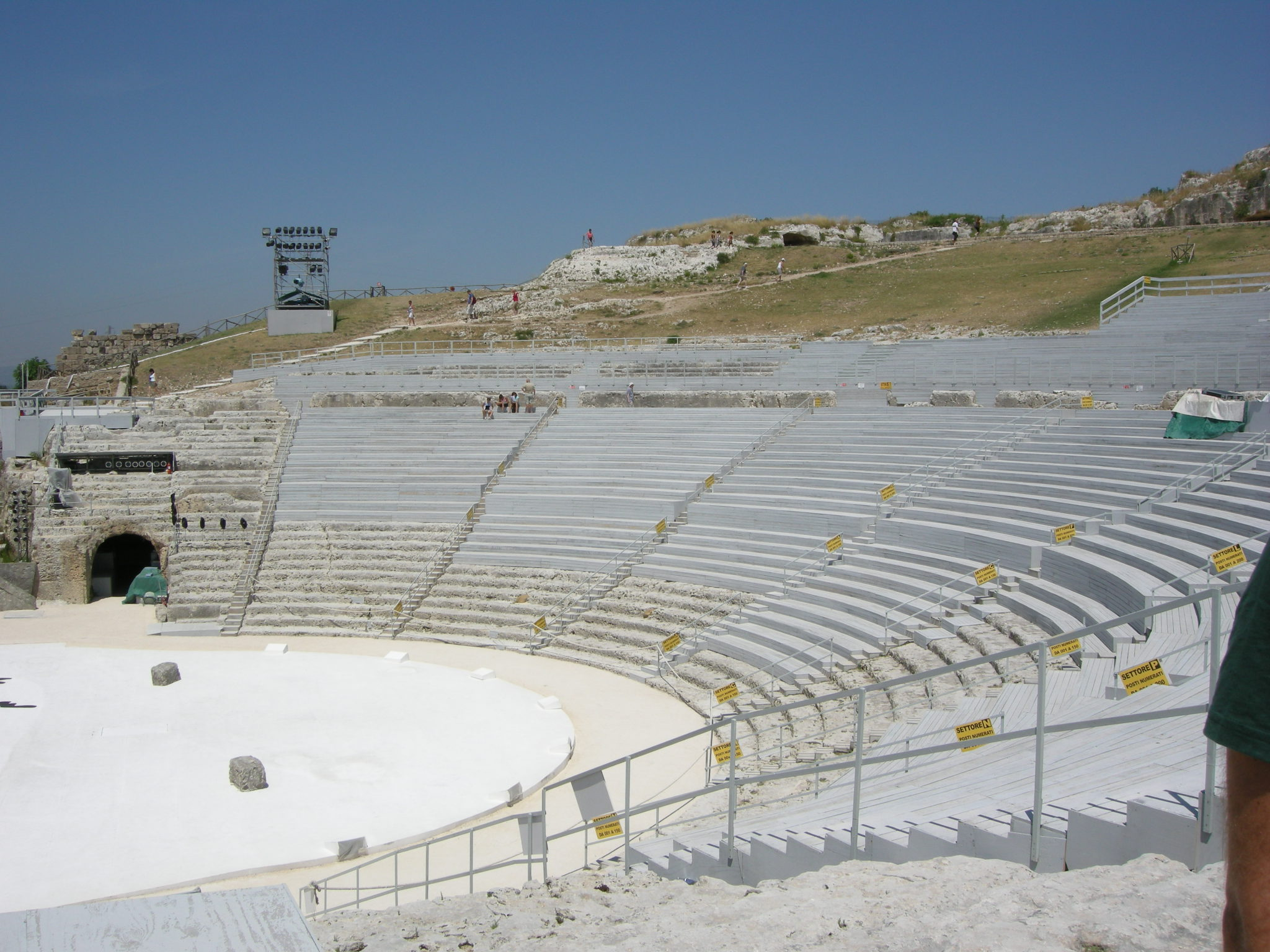 Siracusa, neapolis, teatro greco